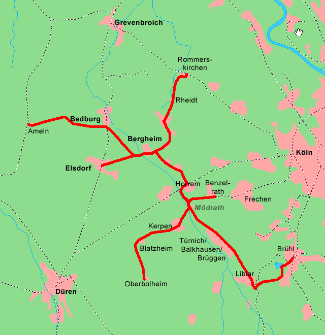 Karte der BK und MLBE